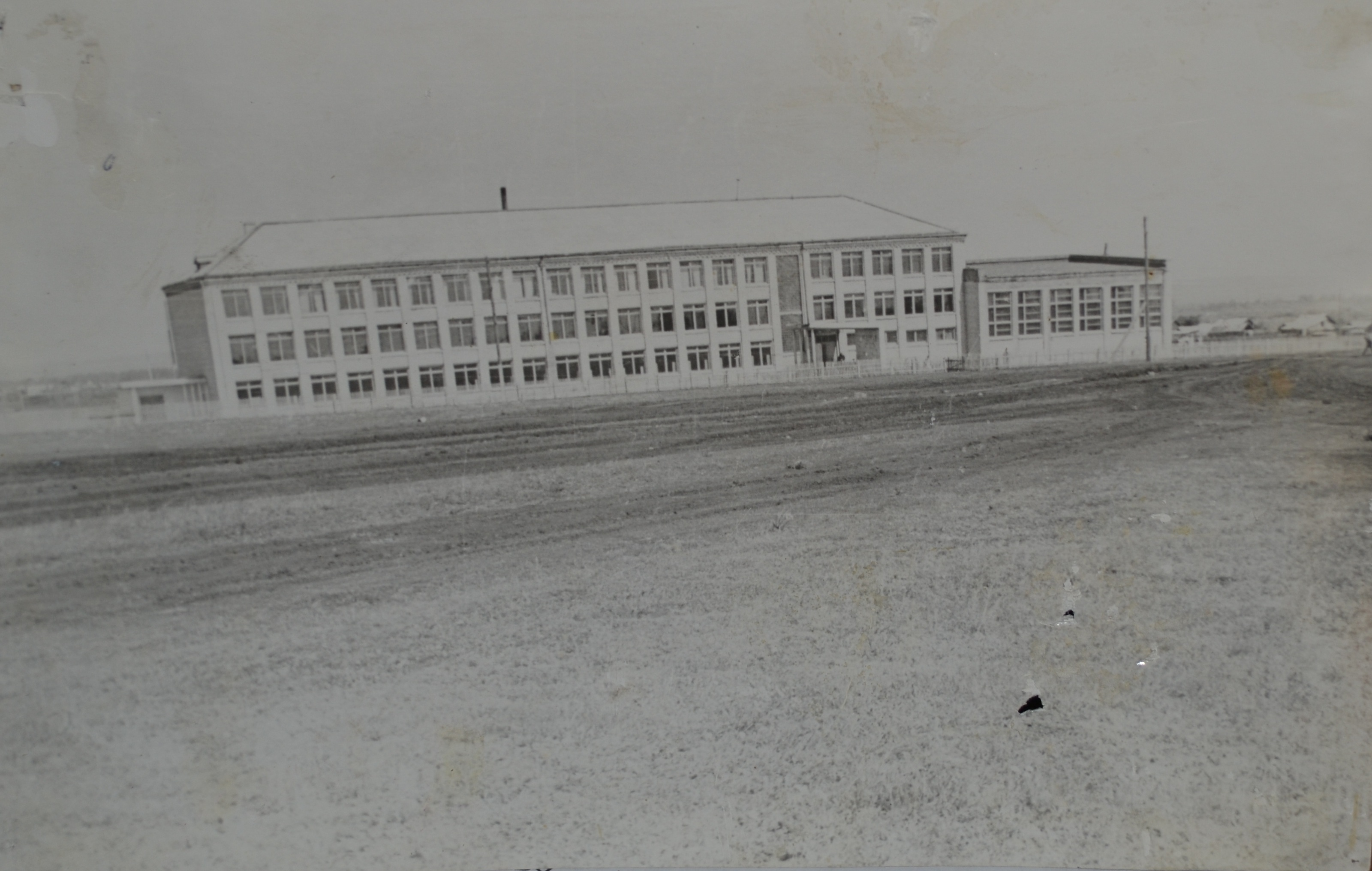 Школа